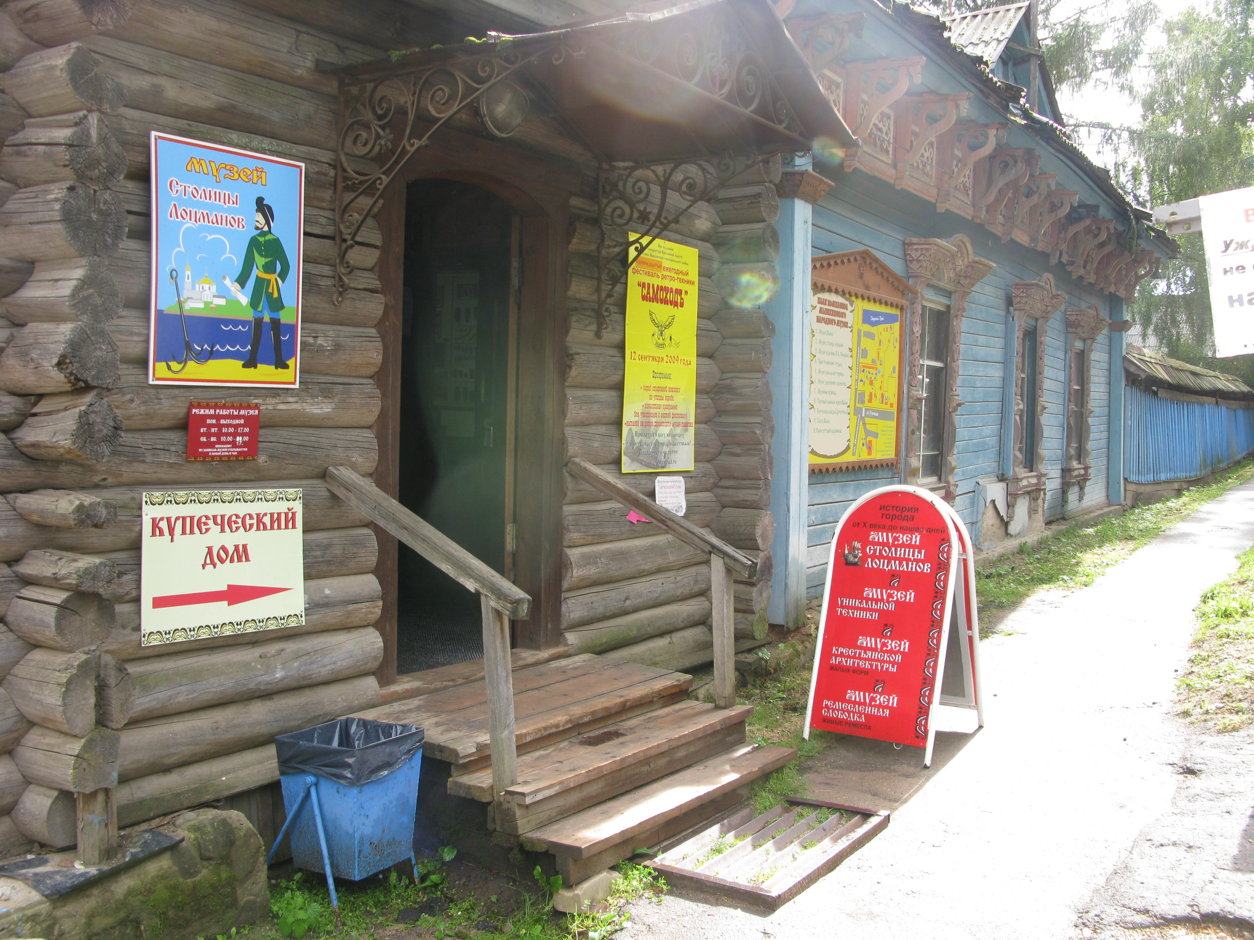 г.Мышкин, Ярославская обл., Россия.